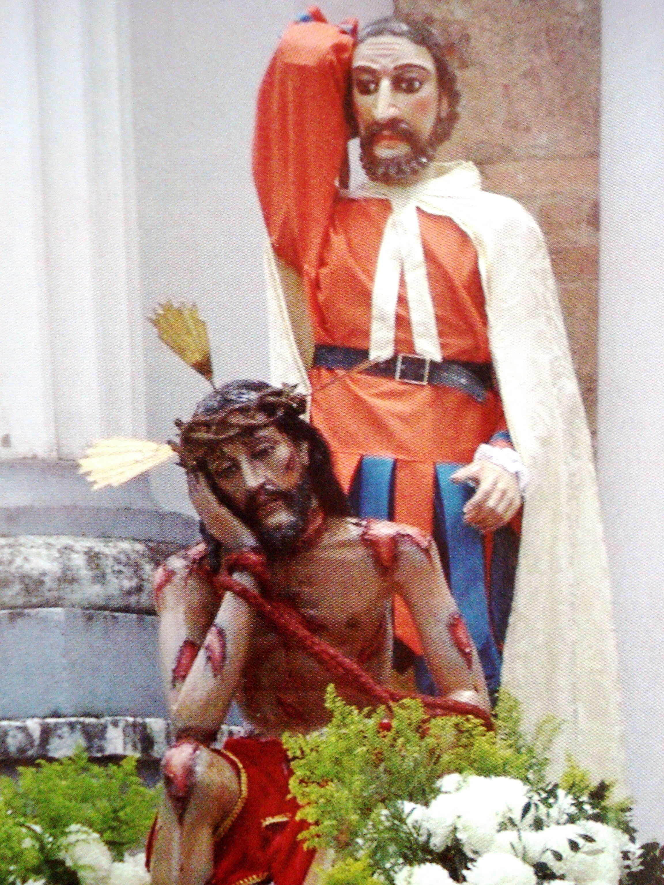 Imagen del Señor de la Humildad. Fotografía del Viernes Santo en Santa Rosa de Osos, Paso de la flagelación.